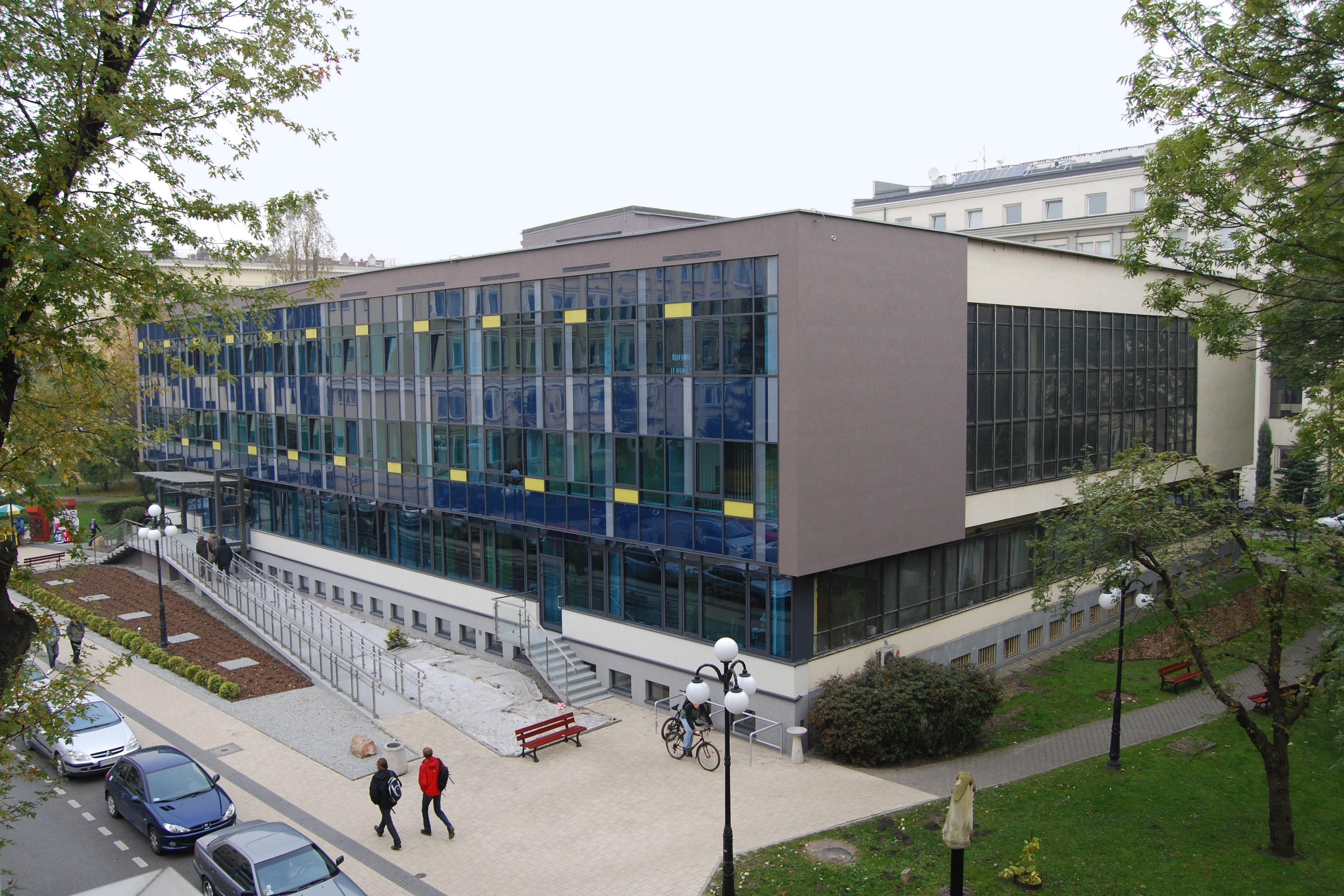 Budynek Biblioteki Głównej AGH w Krakowie